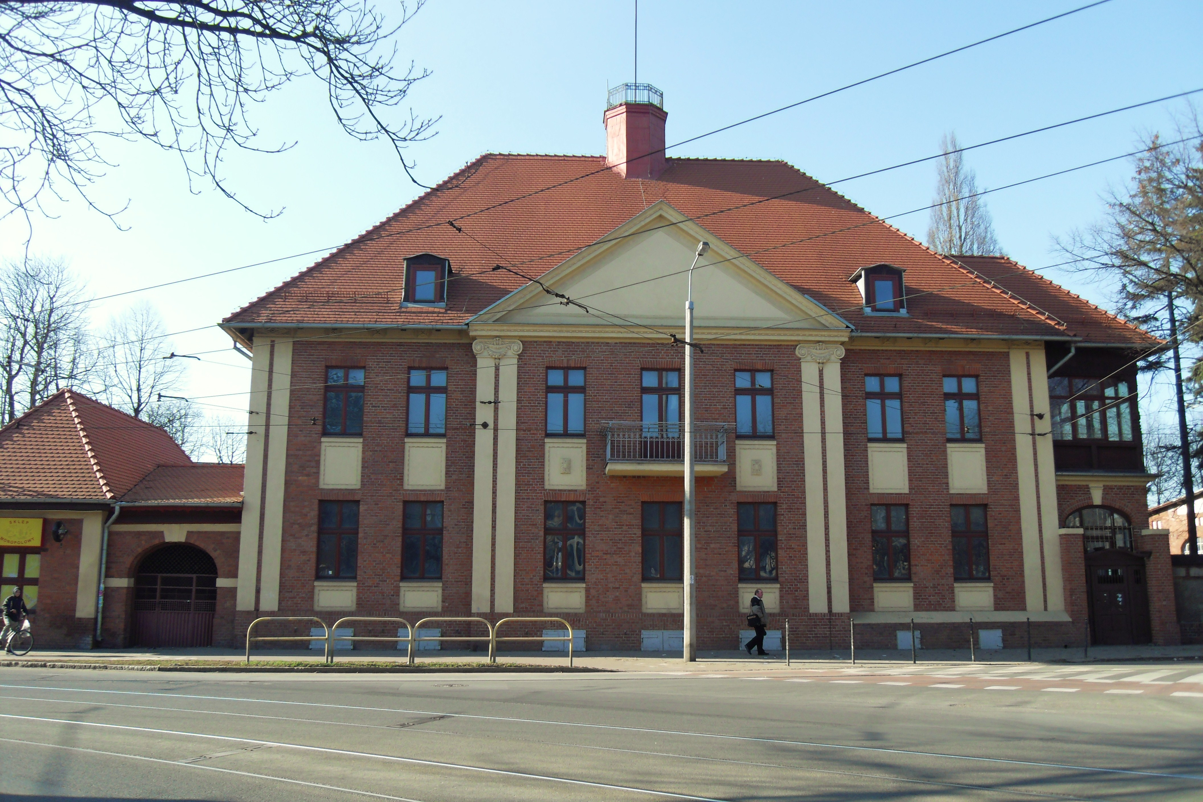 Gdańsk Przeróbka, ul. Siennicka 25 (zabytkowe warsztaty kolejowe).